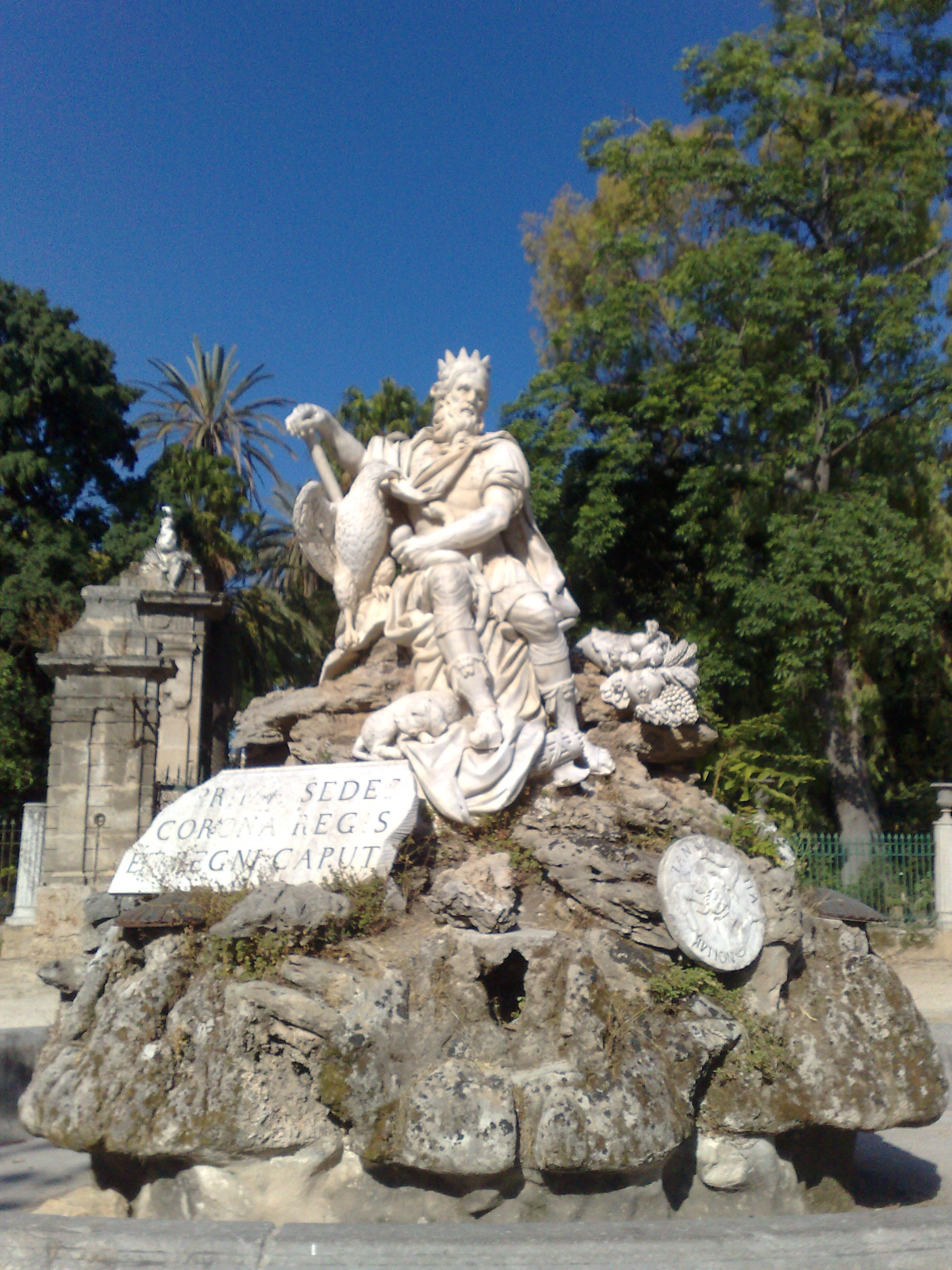 La "Fontana del Genio di Palermo", nella Villa Giulia a Palermo, realizzata da Ignazio Marabitti nel 1778.